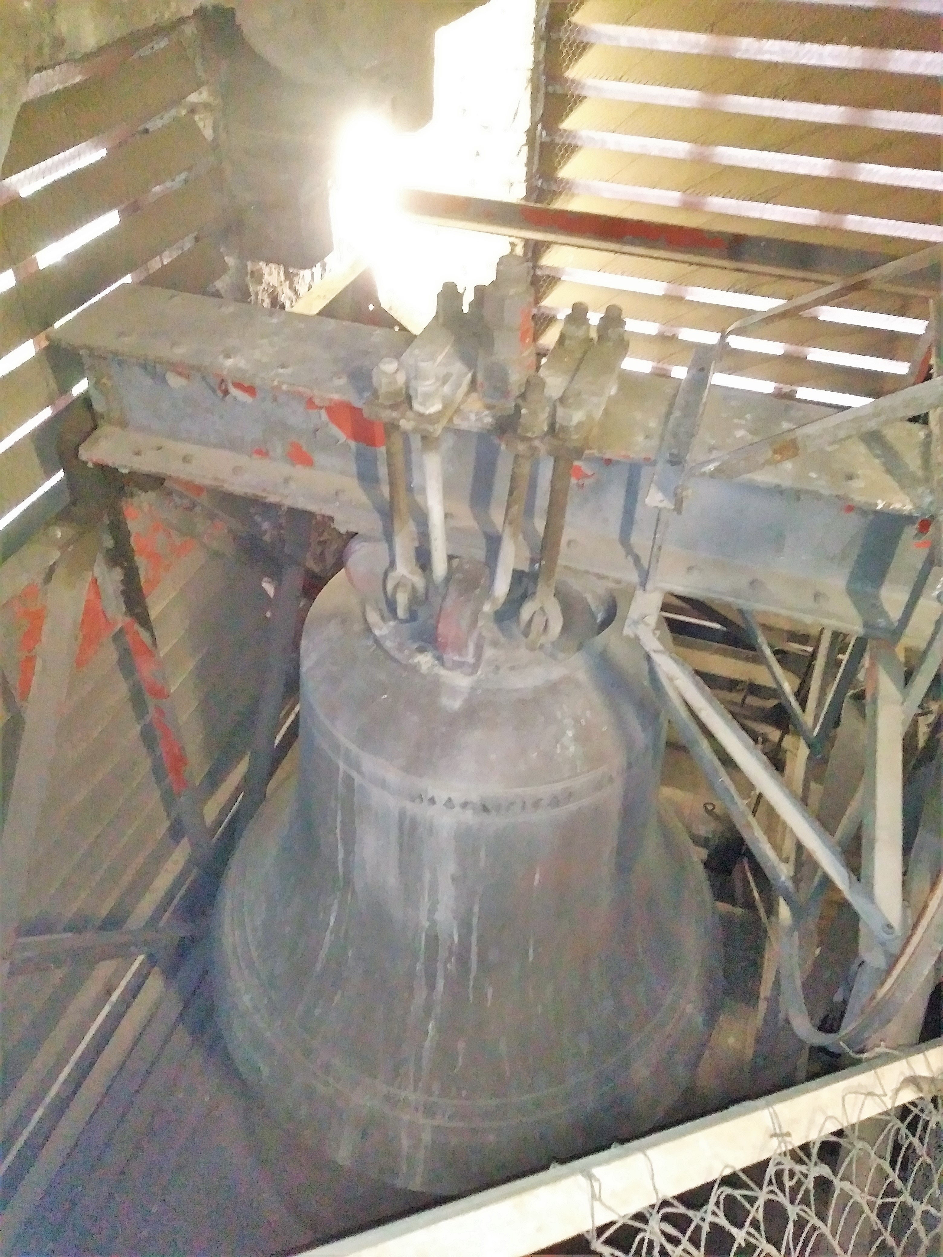 Glockenstube vom Südturm des Saarbrücker Doms St. Michael mit größter Glocke